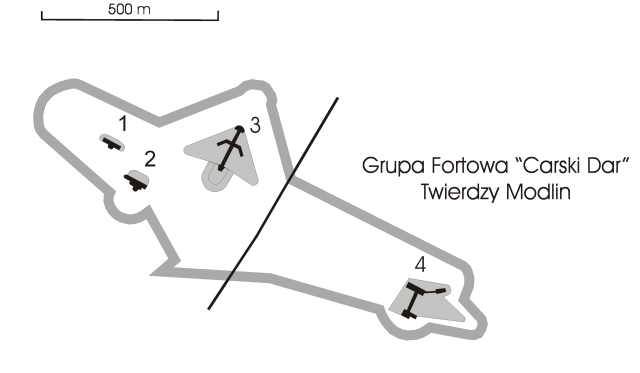 Schemat przedstawiający Grupę Fortową Fortu XV „Carski Dar”.